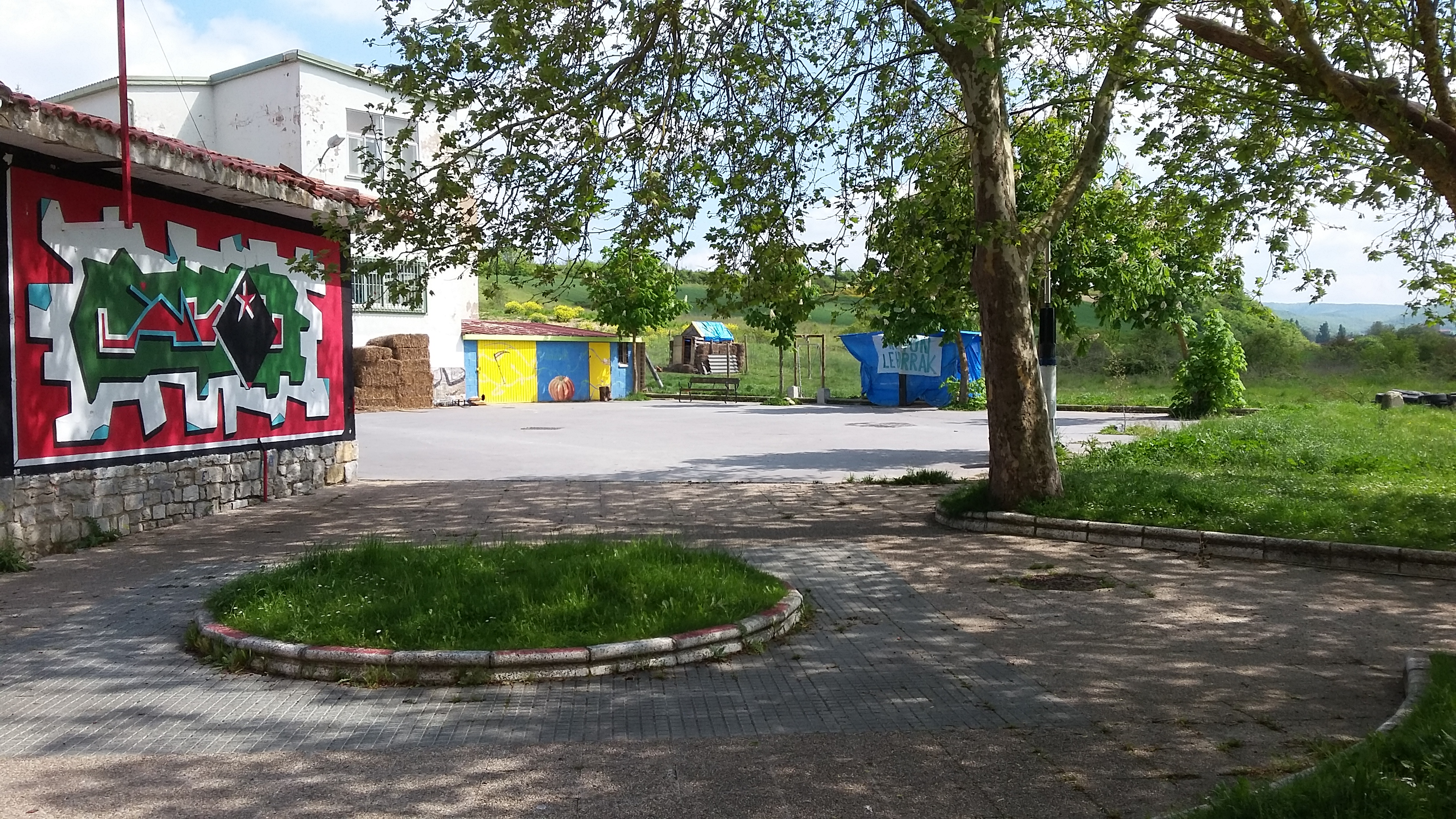 Barrio de Errekaleor, Vitoria-Gasteiz, Álava, País Vasco (España). Plaza.